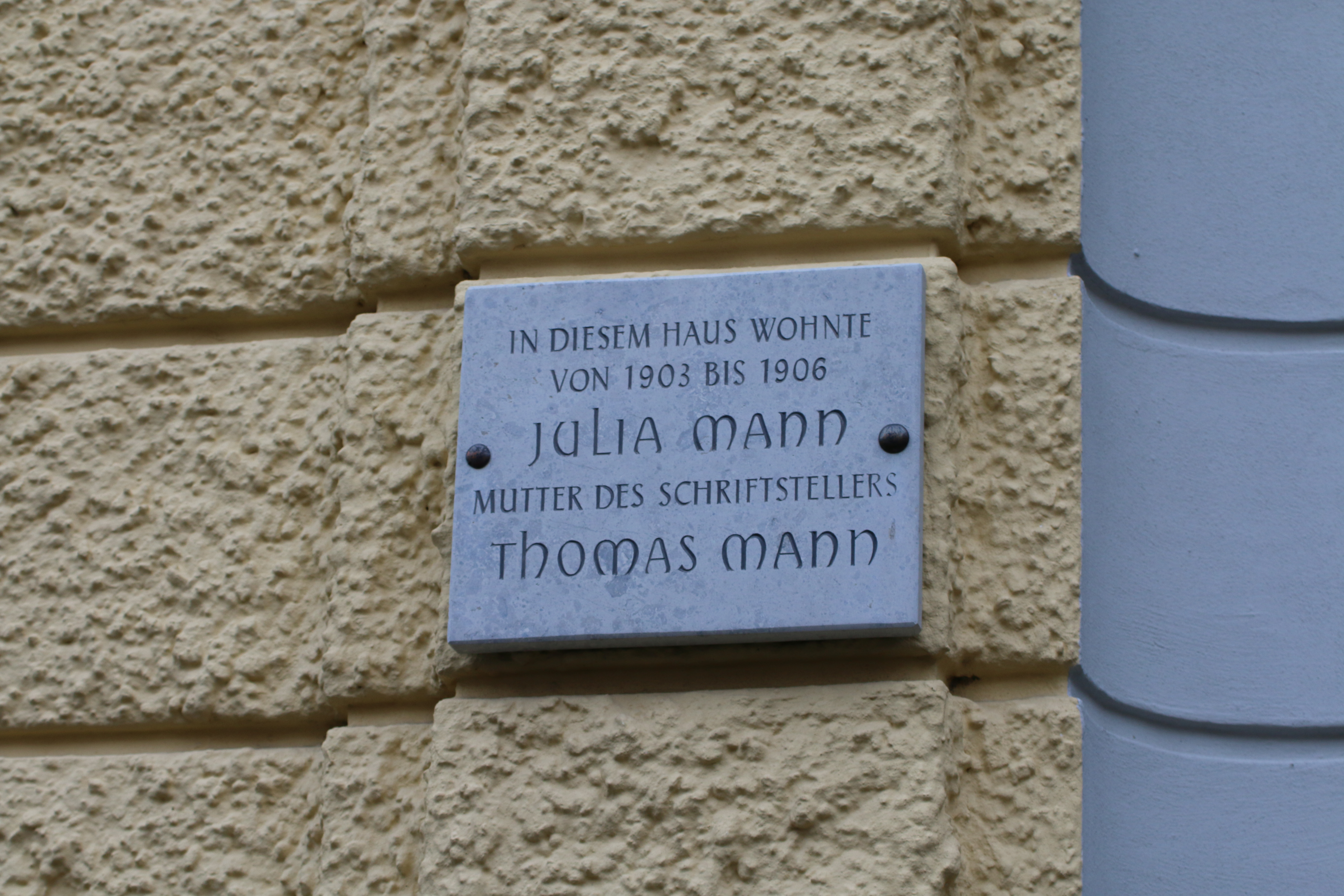 Julia Mann, Gedenktafel an ihrem Wohnhaus in Augsburg (1903–1906) The making of this document was supported by the Community-Budget of Wikimedia Germany.